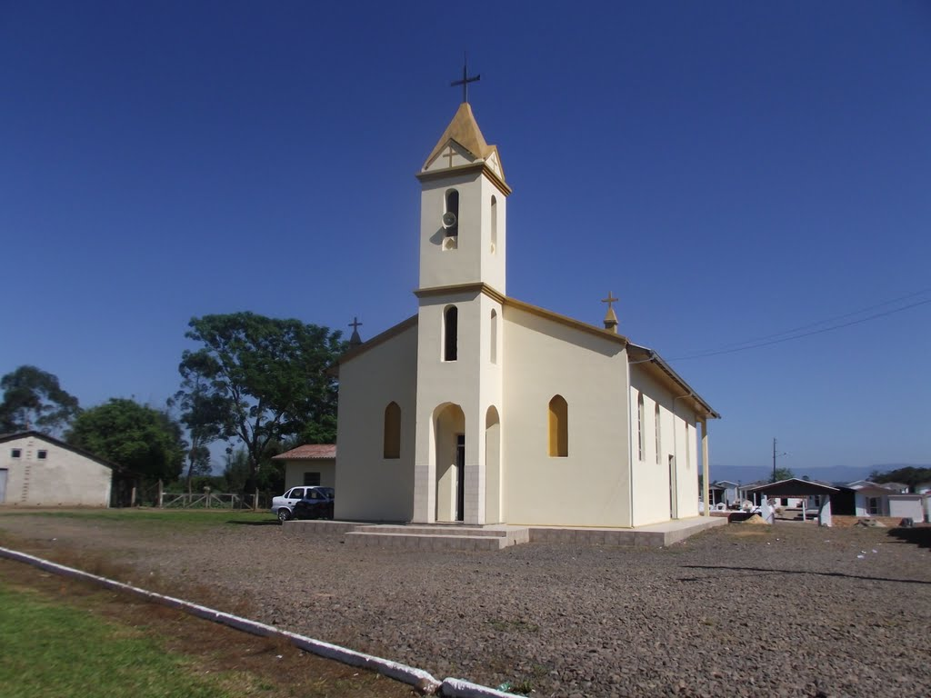 igreja católica de sanga grande